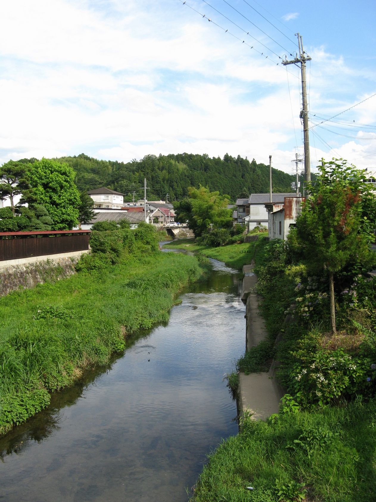 秋野川 睦橋から上流方を望む